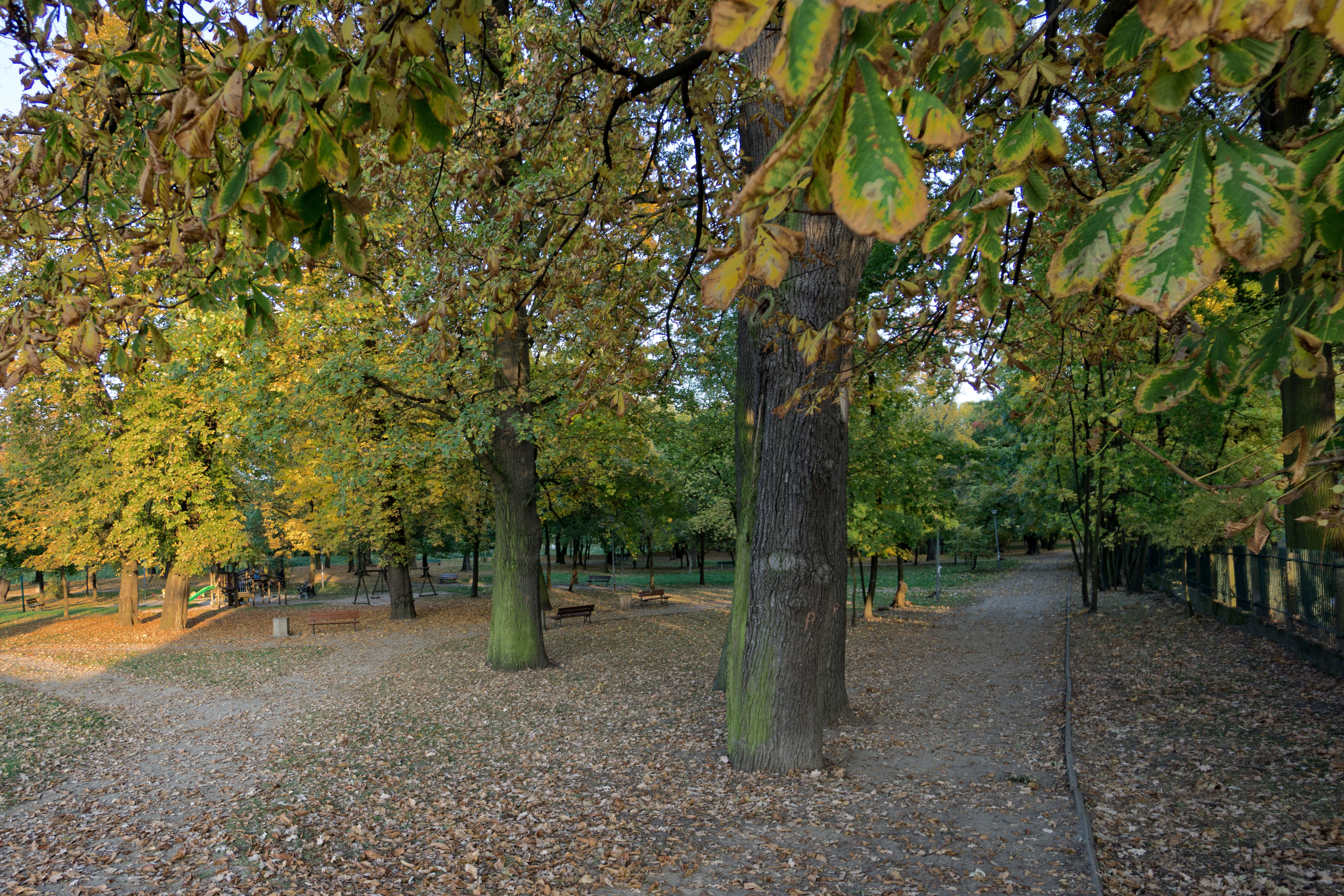 Marki, park, 1870-1880